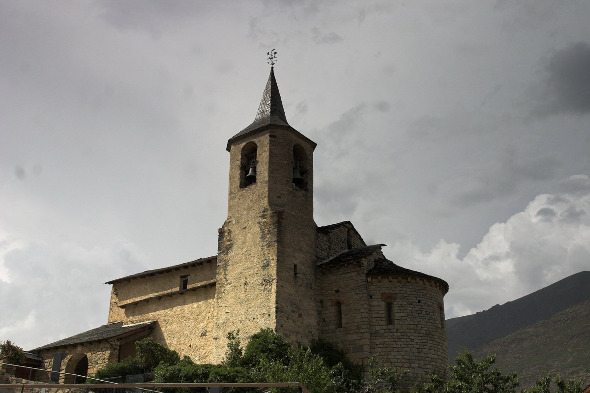 Església romànica s.XII (València d'Aneu, Pallars Sobirà)